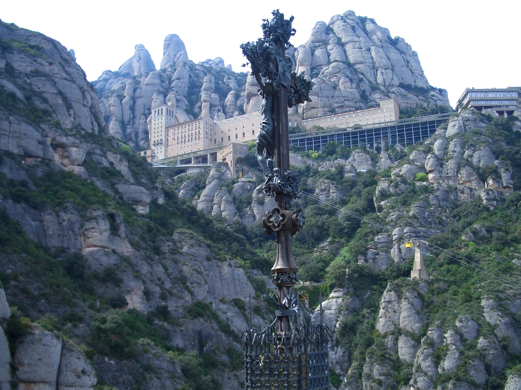 A Montserrat apátság látképe a Szent Barlanghoz vezető útról (Montserrat, Katalónia, Spanyolország)